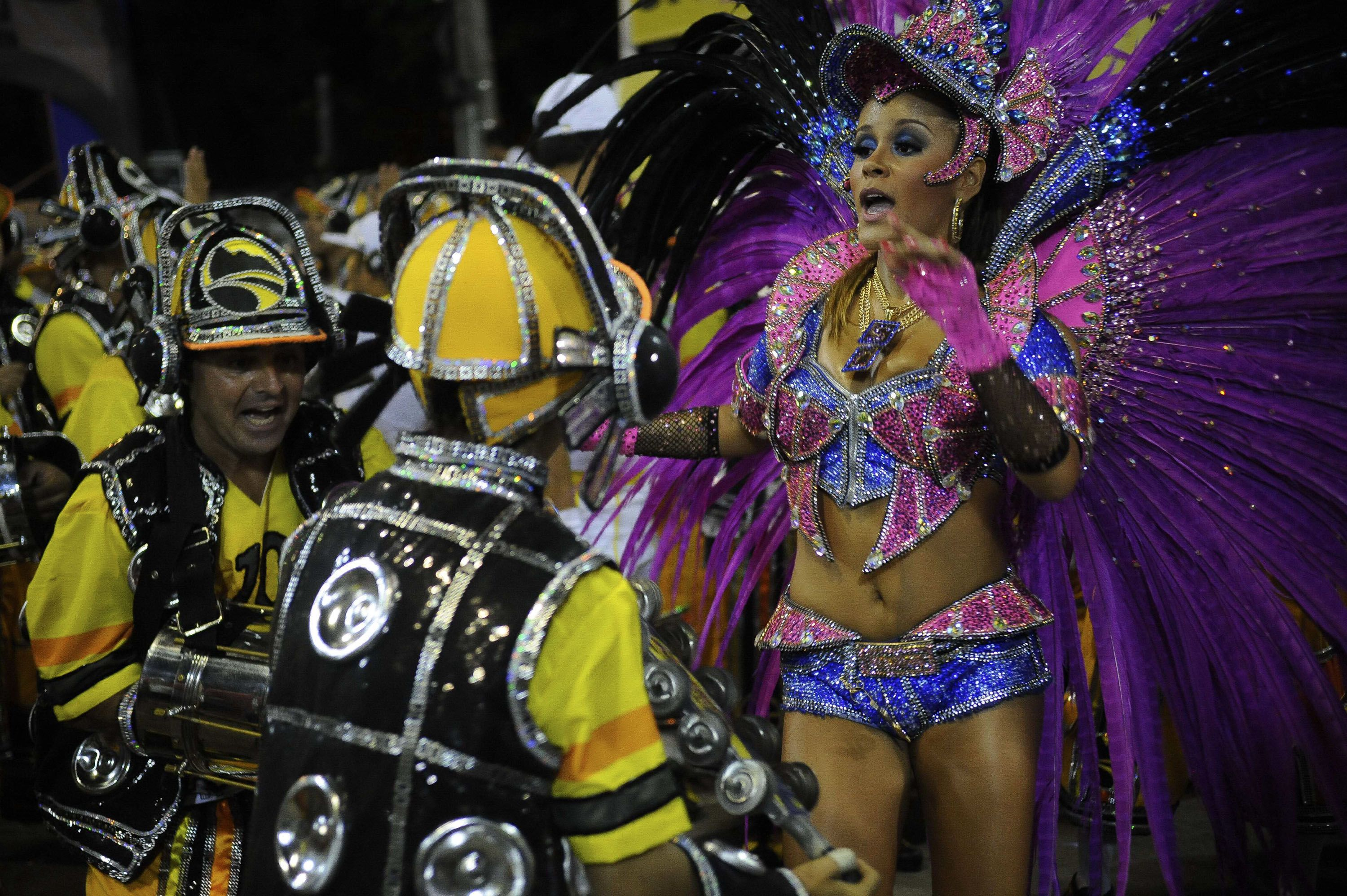 Rio de Janeiro - Escolas de samba do Grupo Especial se apresentam no Sambódromo da Marquês de Sapucaí, no primeiro dia de desfiles (Fernando Frazão/Agência Brasil)